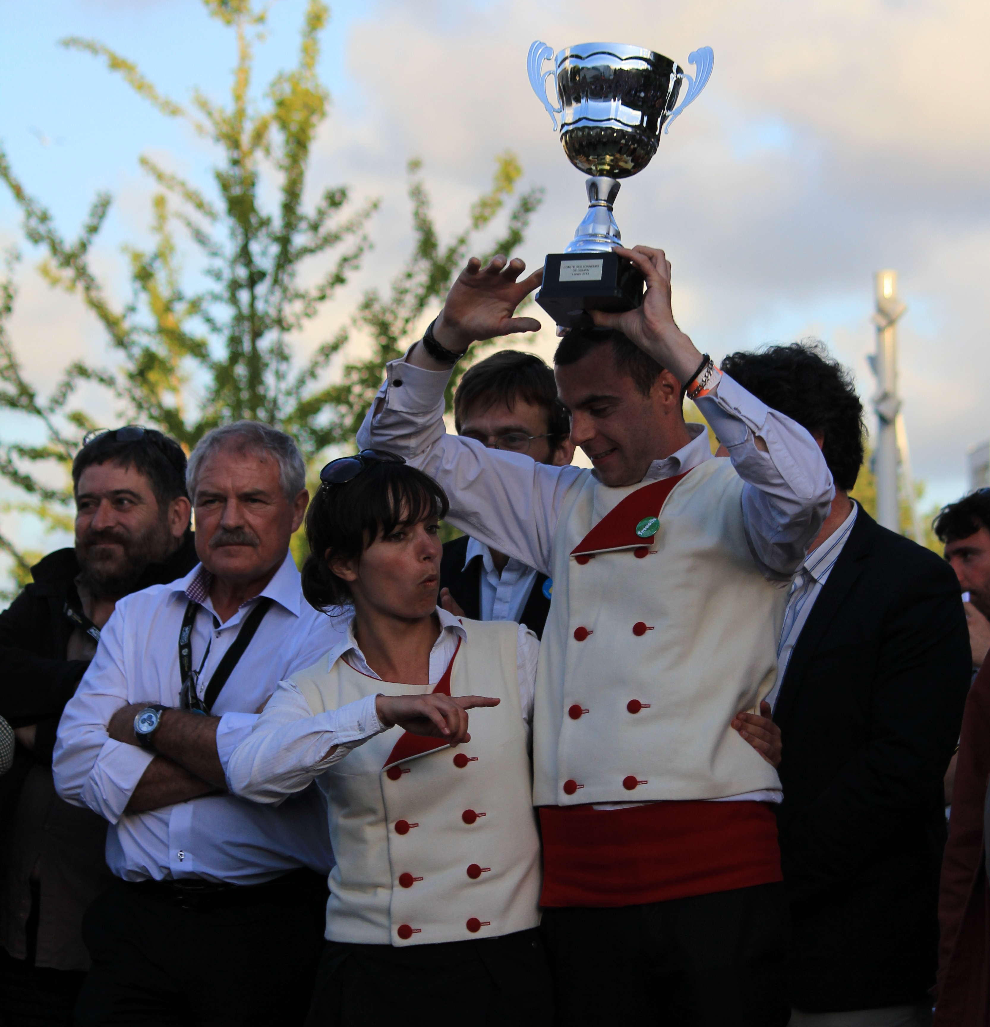 Annonce des résultats du championnat national des bagadoù 2013 dans le cadre du festival interceltique de Lorient : Bagad Saozon Sevigneg